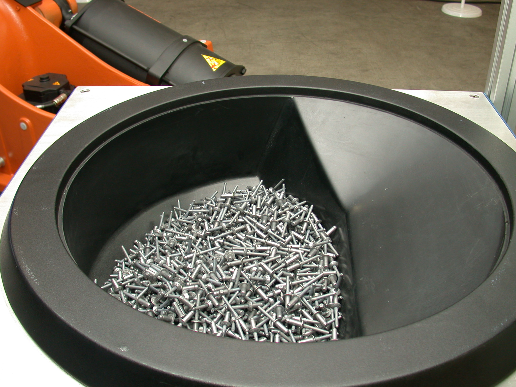 Blindniete in einem Zuführ-Schwingtopf für eine Blindniet-Roboter-Setzanlage